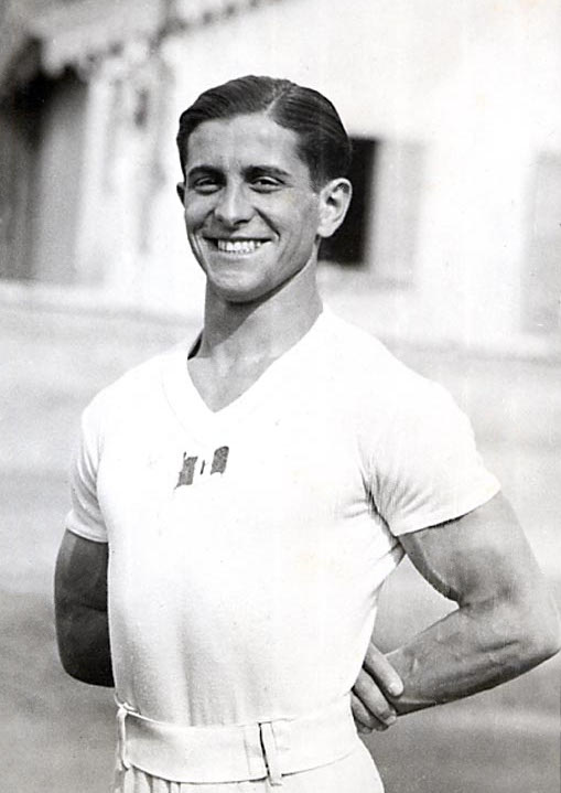 Savino Guglielmetti